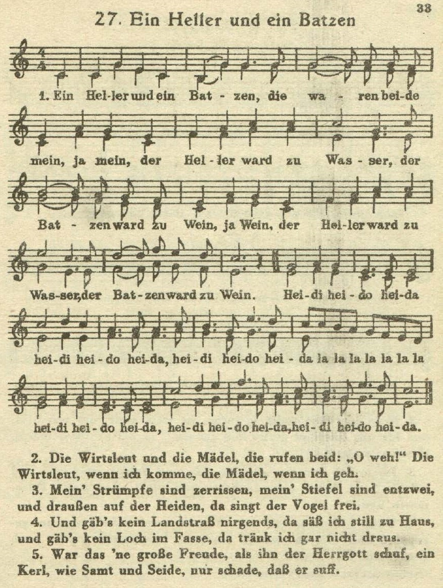 Ein Heller und ein Batzen im Wehrmachts-Liederbuch 1938